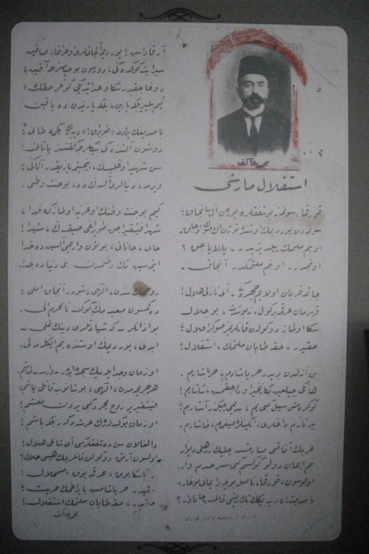 İstiklal Marşı , Osmanlıca